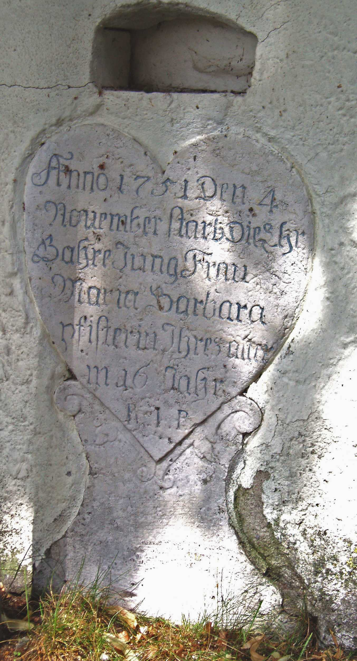 Barock-Grabdenkmal von 1751 in Biesenhard im Landkreis Eichstätt